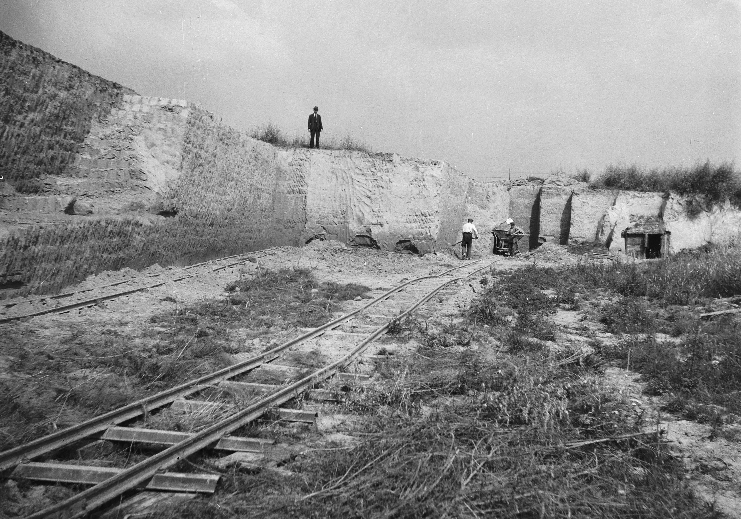 Collectie / Archief : Fotocollectie Arbeidsinspectie Reportage / Serie : [ onbekend ] Beschrijving : 6x6.5 Ongeval kleigroeve Belvedere, Maastricht Datum : ongedateerd Locatie : Maastricht Trefwoorden : afgravingen Fotograaf : [onbekend] Auteursrechthebbende : Nationaal Archief Materiaalsoort : Negatief (zwart/wit) Nummer archiefinventaris : bekijk toegang 2.24.03 Inventarisnummer : 2276 Bestanddeelnummer : 256-0715